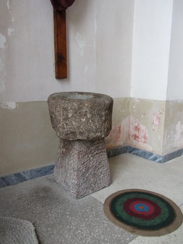 Пескі (Мастоўскі раён). Касцёл Маці Божай Ружанцовай